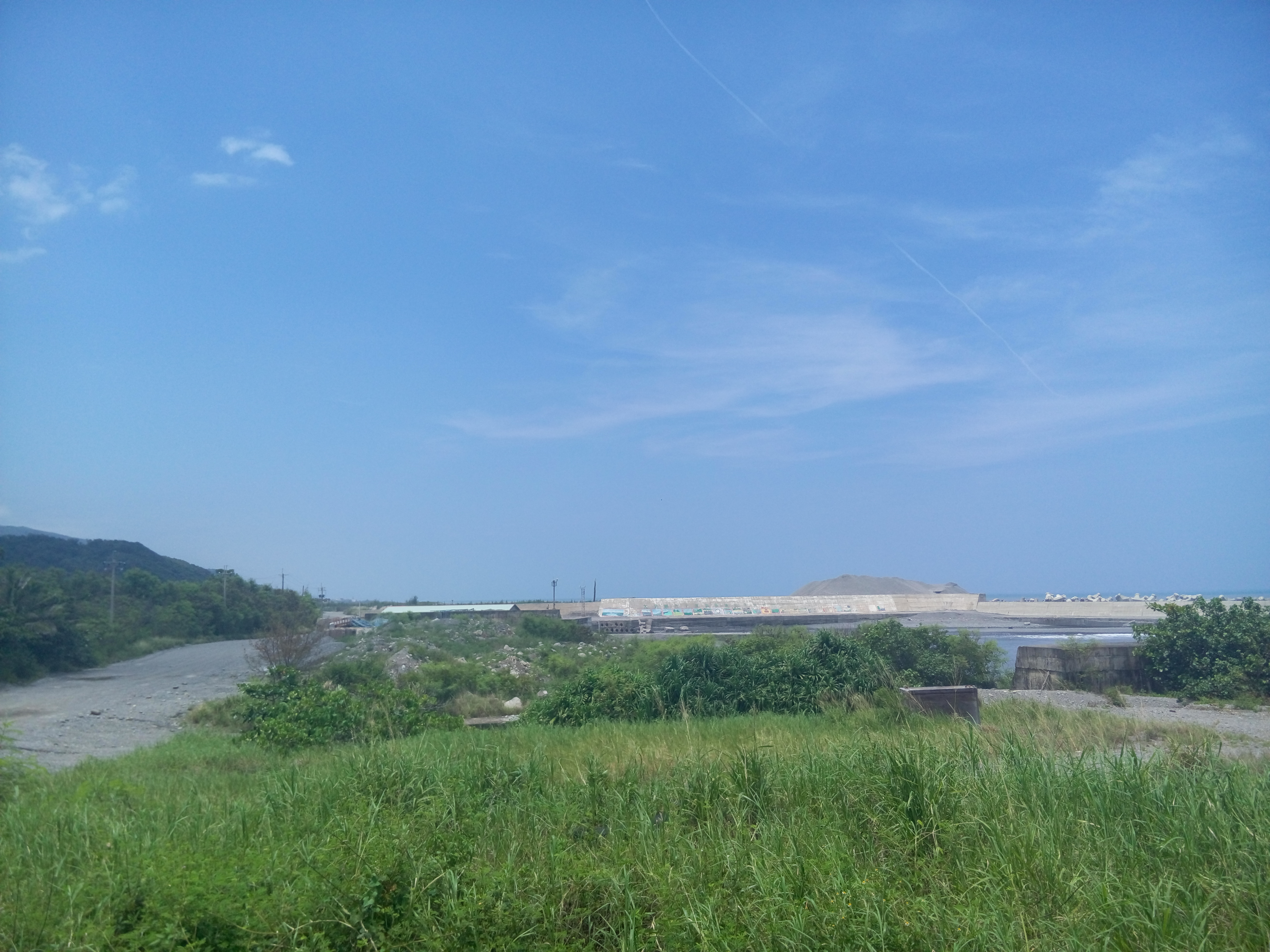 中文（台灣）: 臺灣臺東縣大武鄉尚武漁港外港